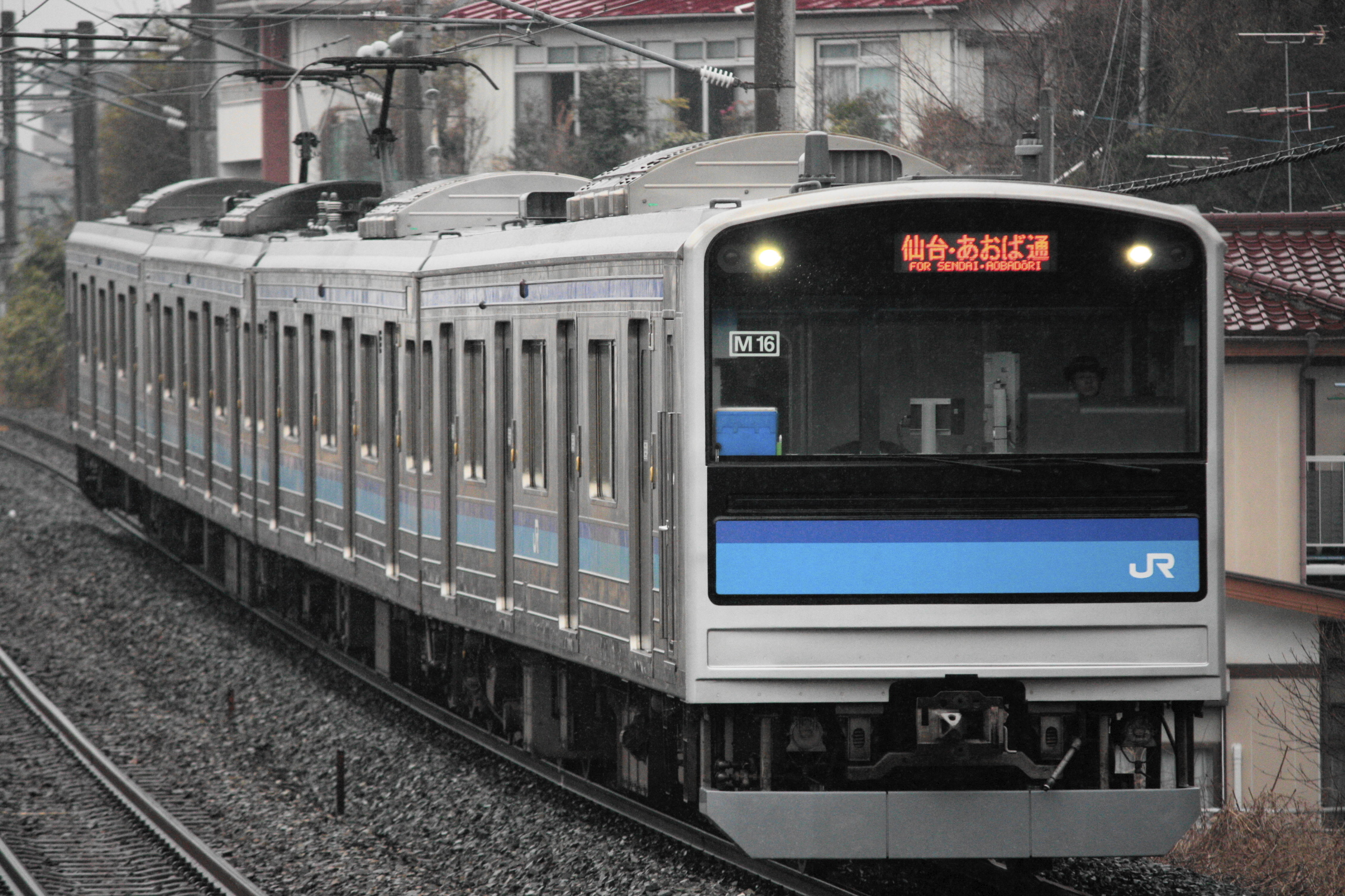 205系3100番台（西塩釜駅にて）